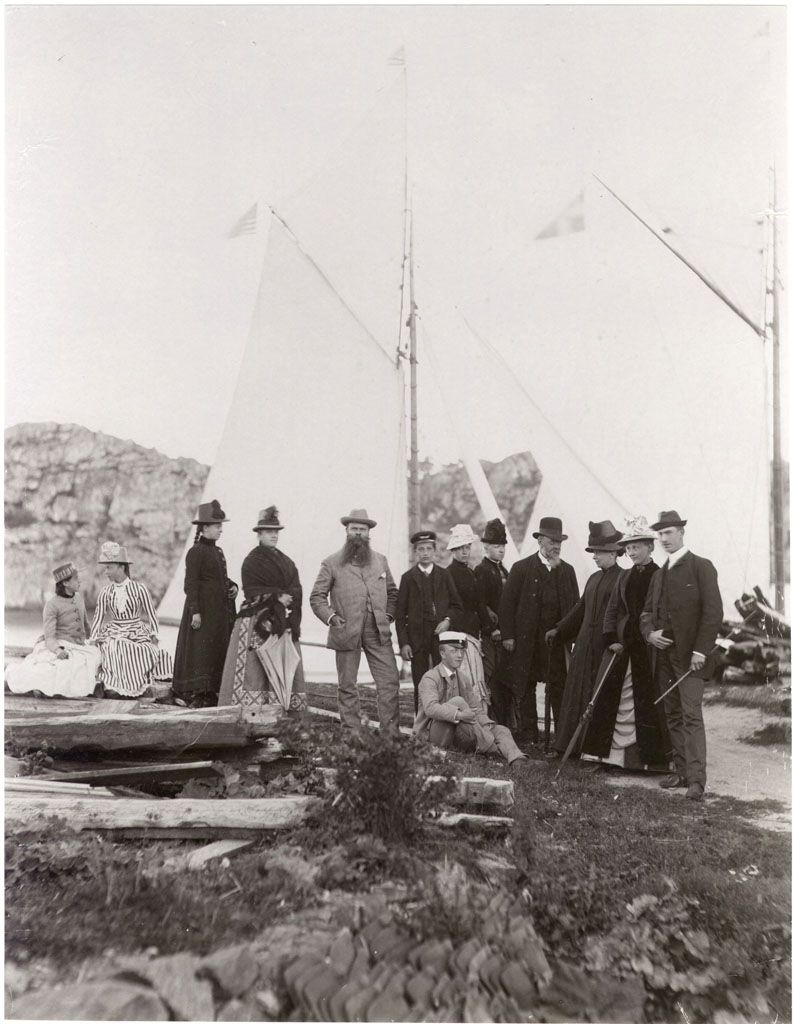 The American ambassador William W. Thomas Jr (bearded man) visiting the Curman family in Lysekil. Amerikanske ambassadören William W. Thomas Jr (mannen med skägg) på besök. Parish (socken): Lysekil Province (landskap): Bohuslän Municipality (kommun): Lysekil County (län): Västra Götaland Photograph by: Carl Curman Date: 1890s Format: Albumen print Kulturmiljöbild: 16000300029171 (Persistent URL) Read more about the photo database (in english)